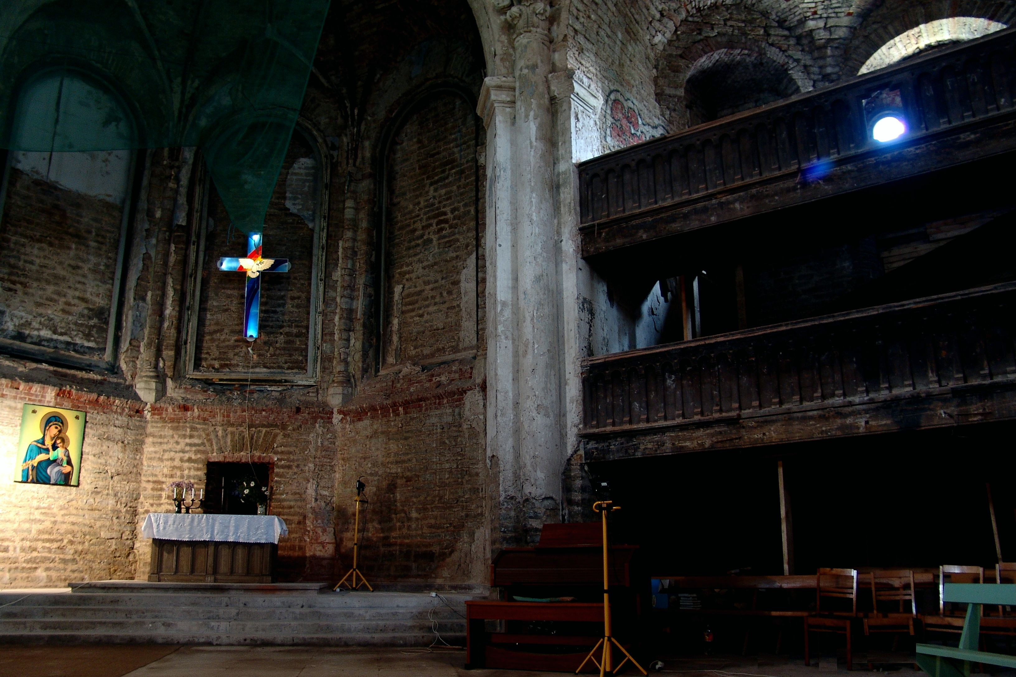 Александровская лютеранская церковь в Нарве